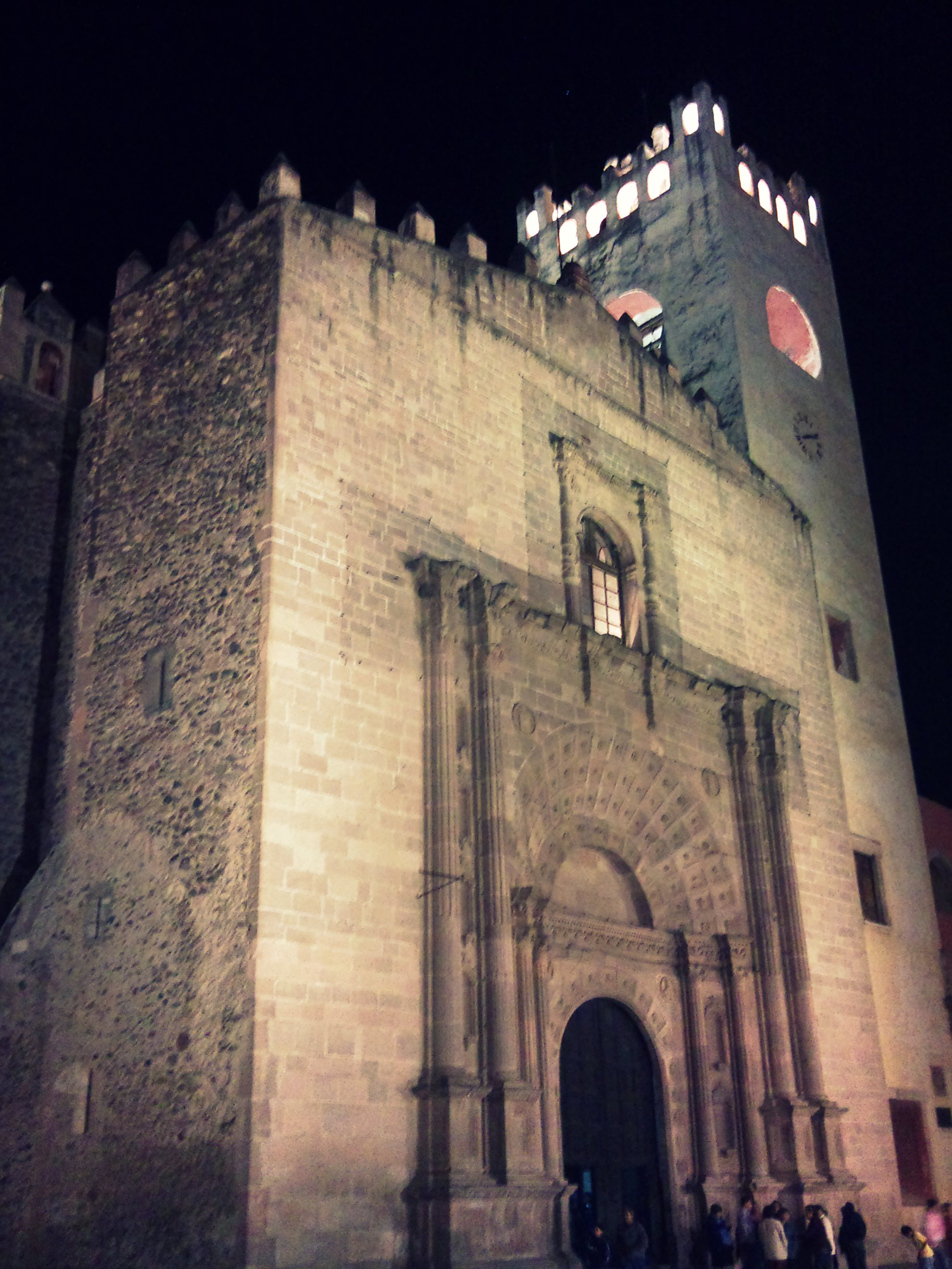 Ex Convento de San Nicolás de Tolentino por las noches, en Actopan, Hgo., México